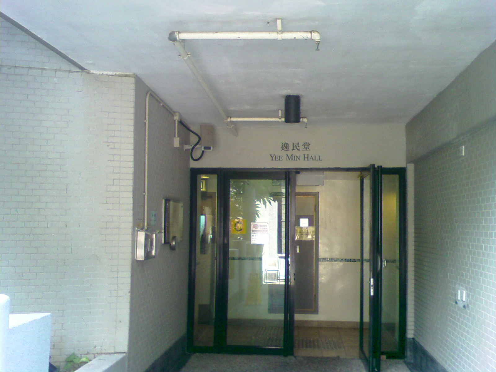 Yee Min Hall